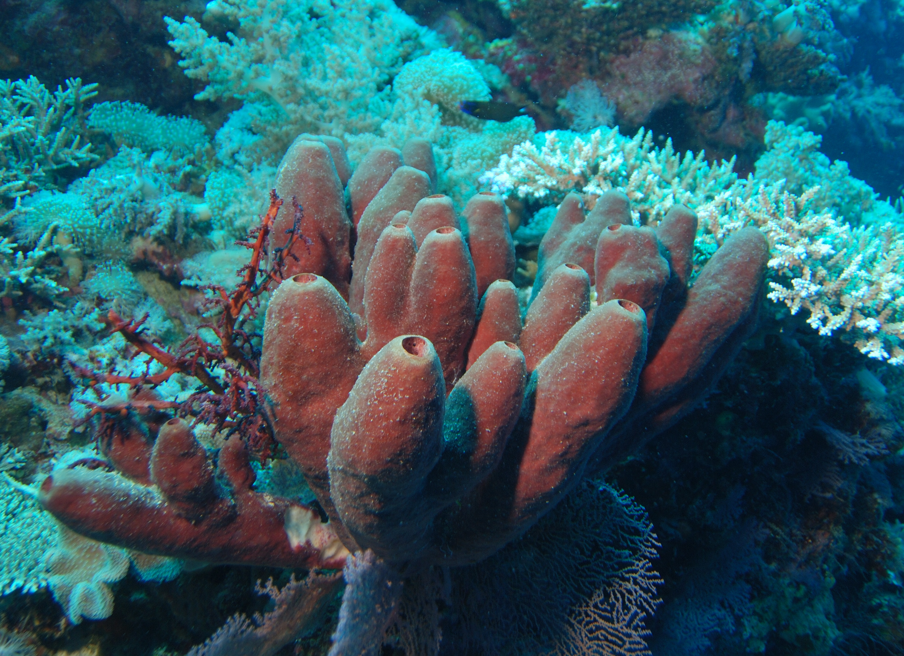 Porifera